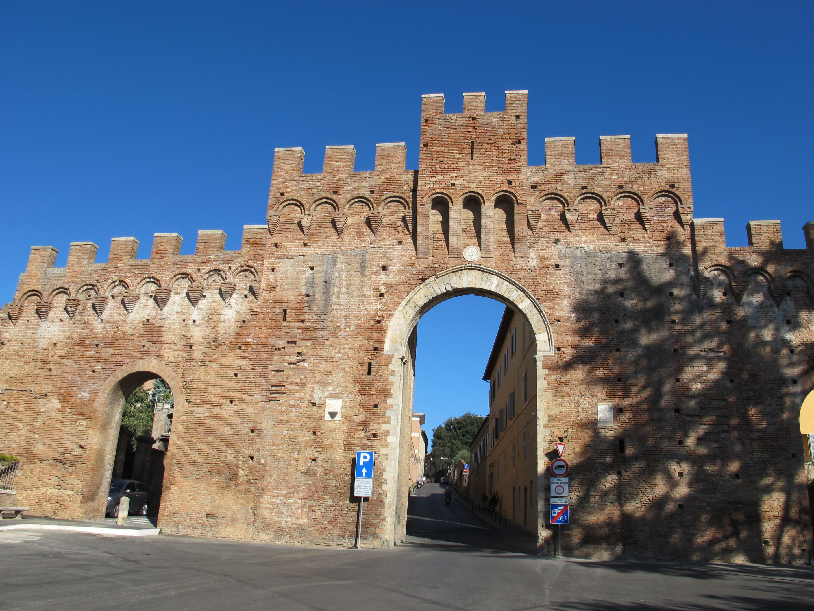 Porta Tufi